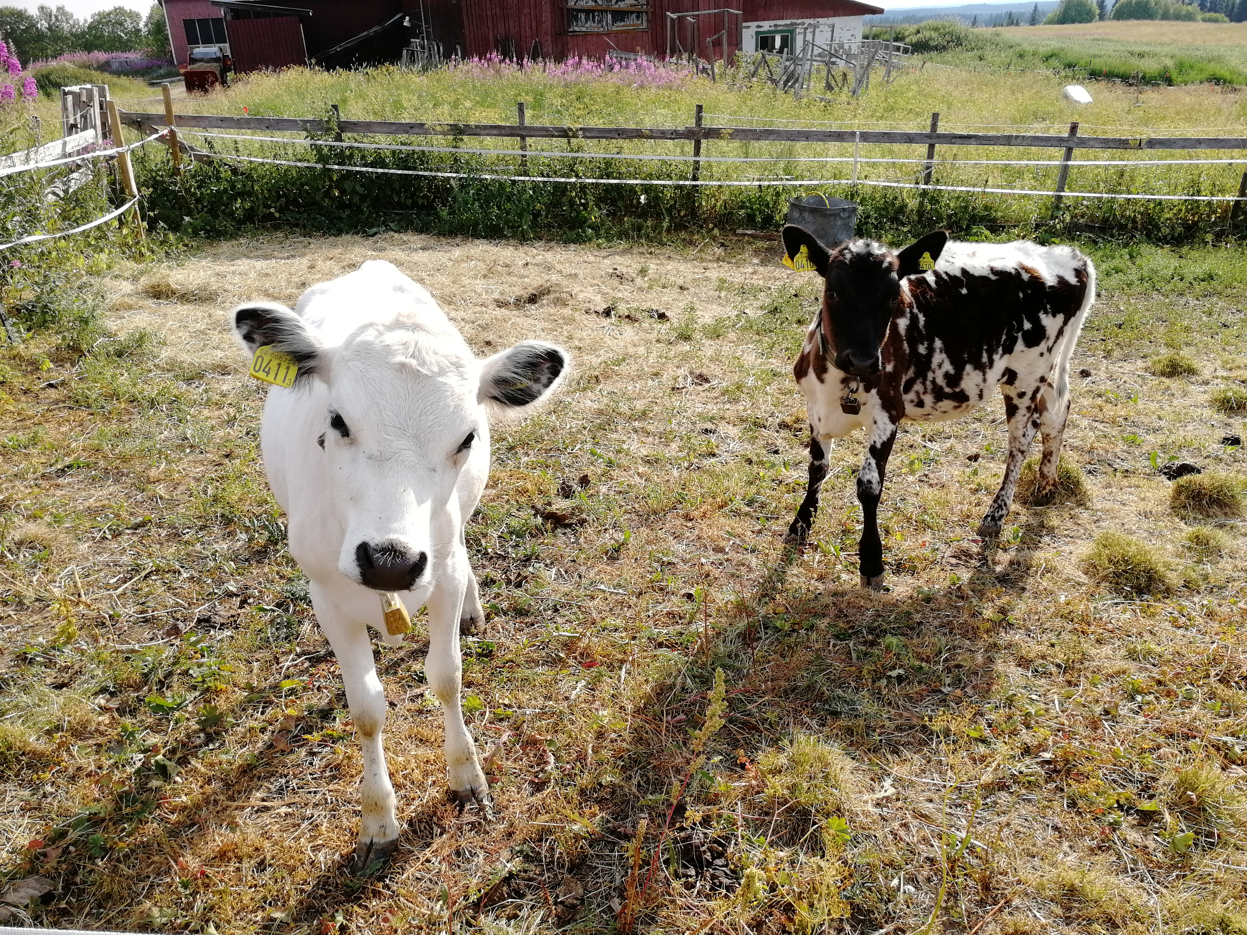 Kalvar, Yxskaftkälen